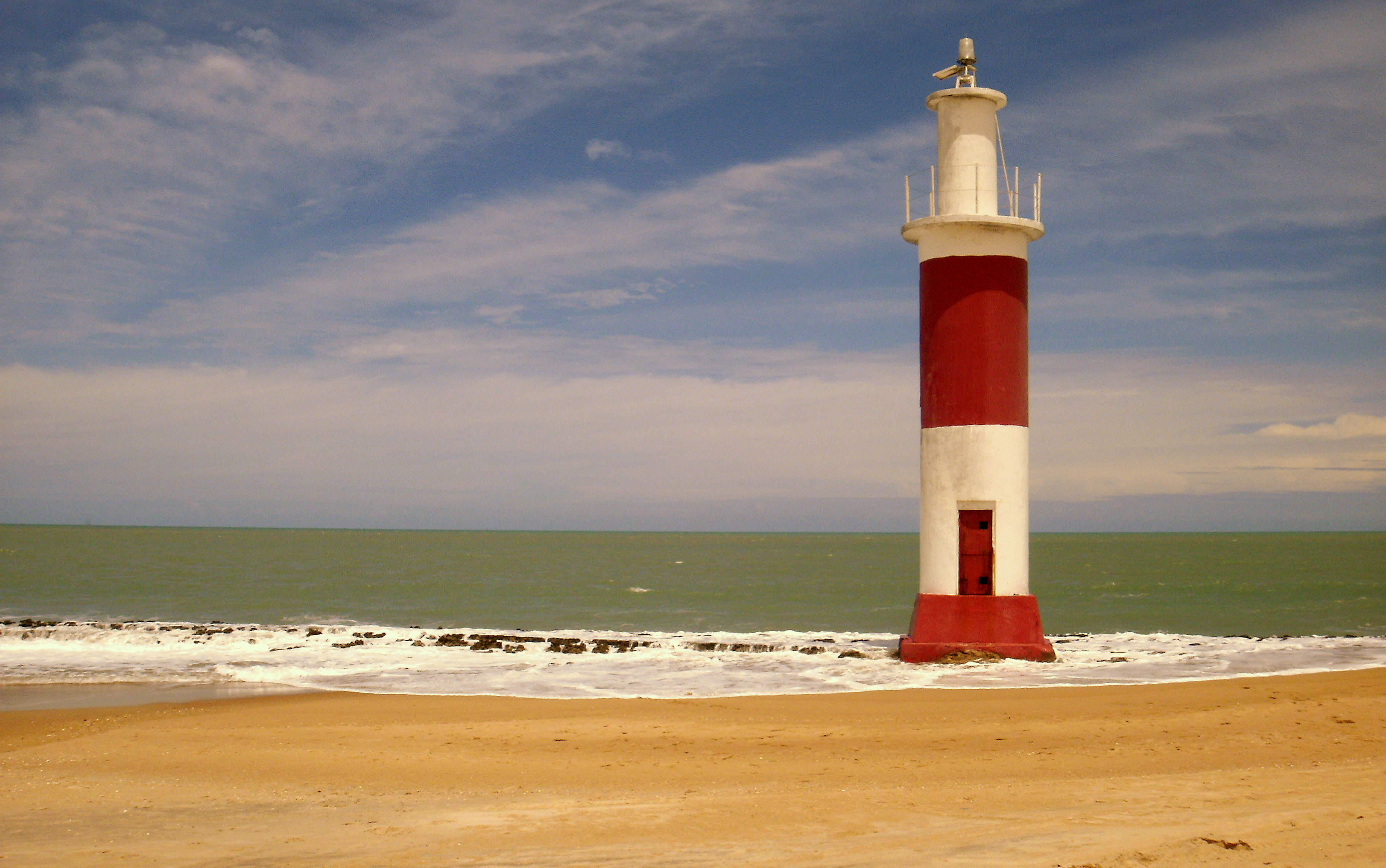 Faro de Galinhos, Río Grande do Norte, Brasil